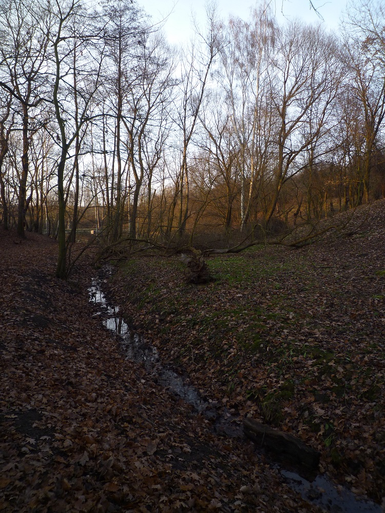 Koryto Čimického potoka.Přírodní památka Čimické údolí, Praha.